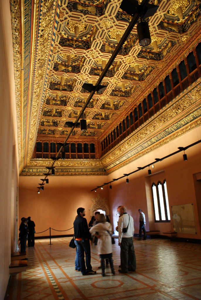 Bello artesonado de una gran sala del Palacio de la Aljafería. Zaragoza, Aragón